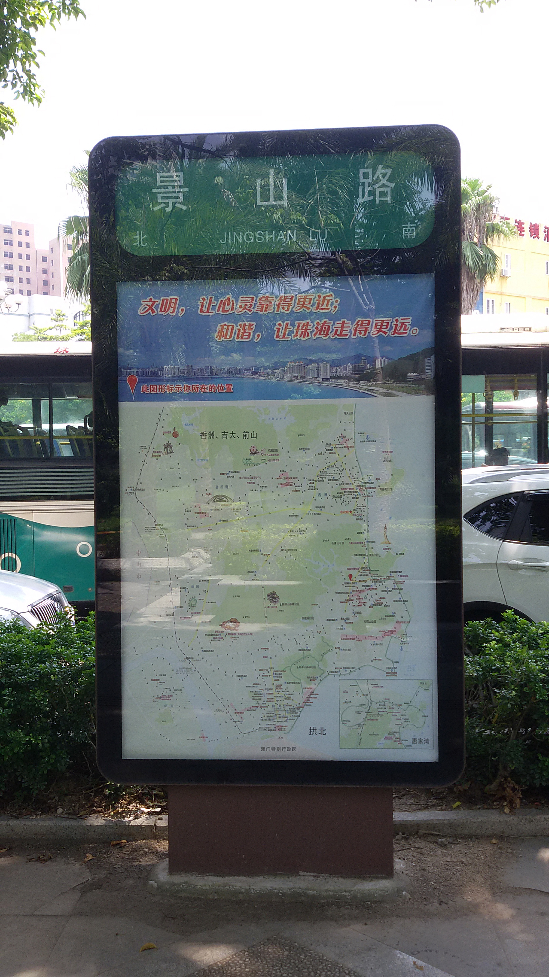 粵語: 景山路嘅路牌